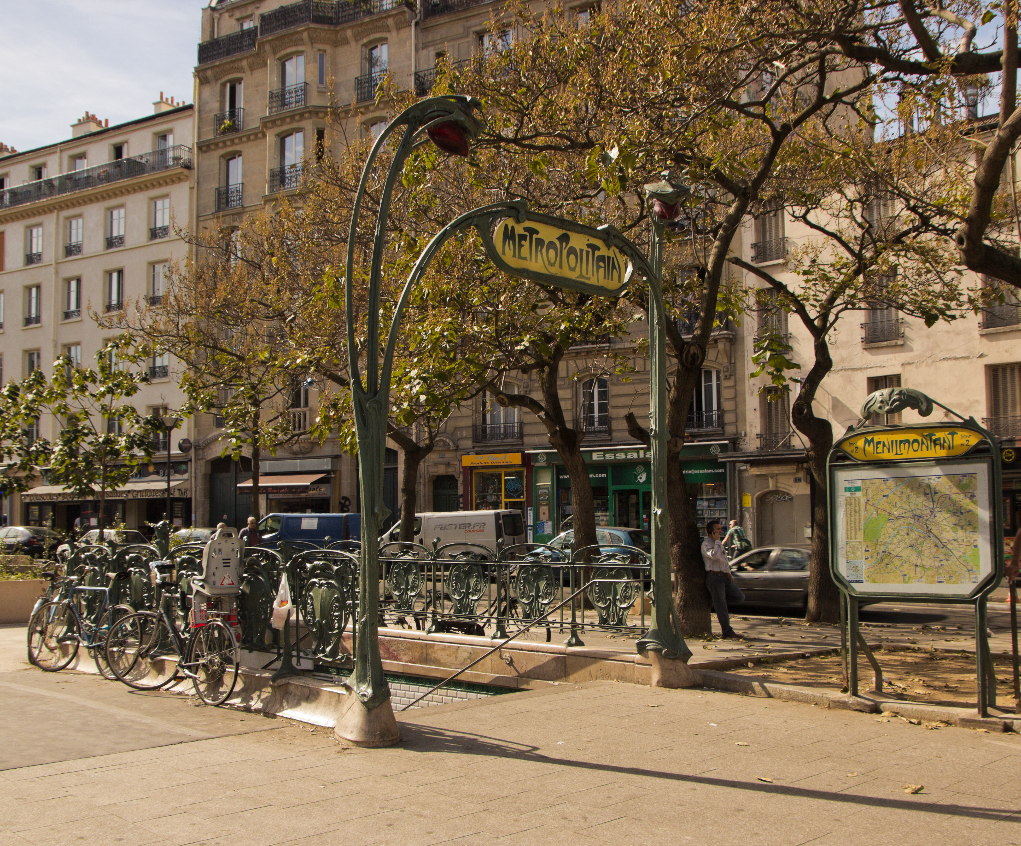 Édicule Guimard de la station Ménilmontant .